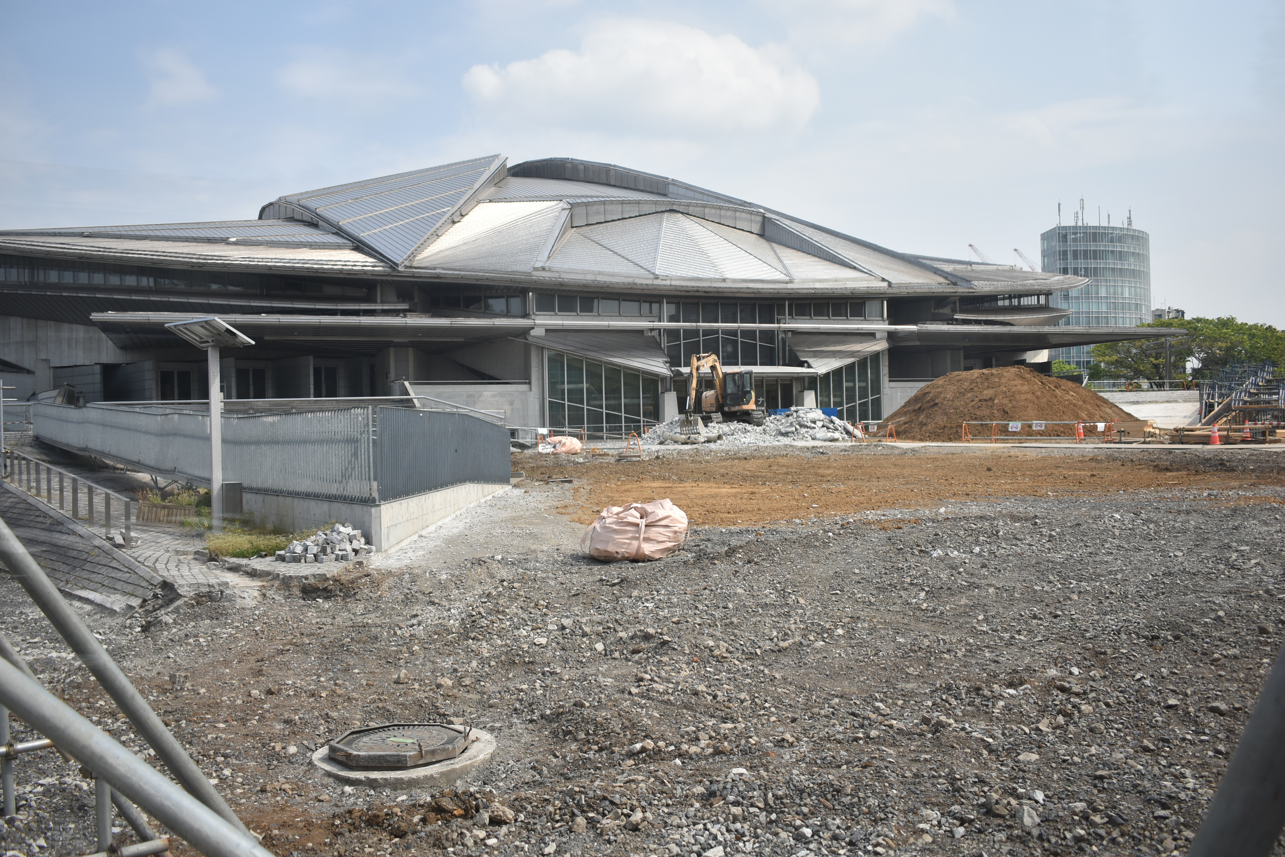 東京都体育館 Nikon D3400